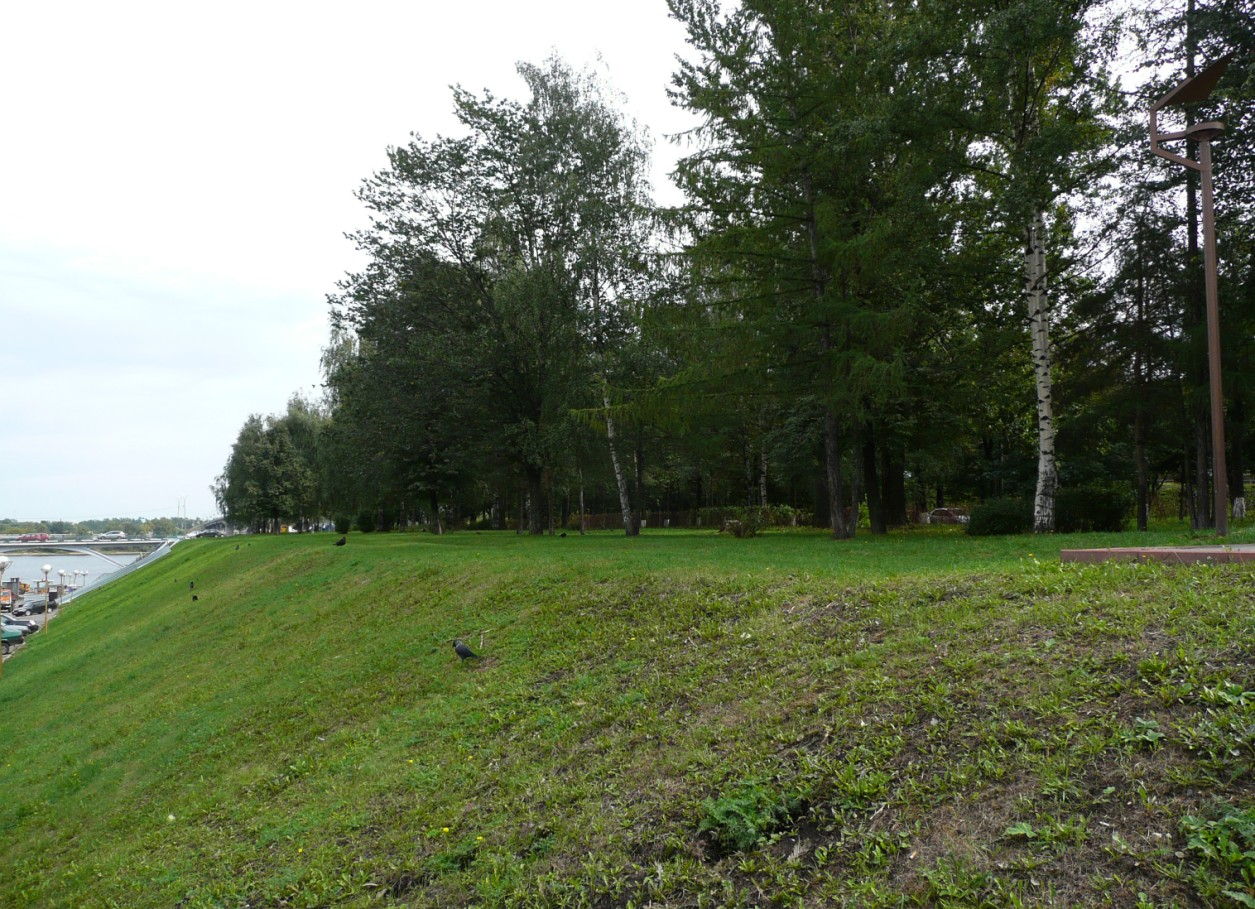 Волжский спуск в Ярославле